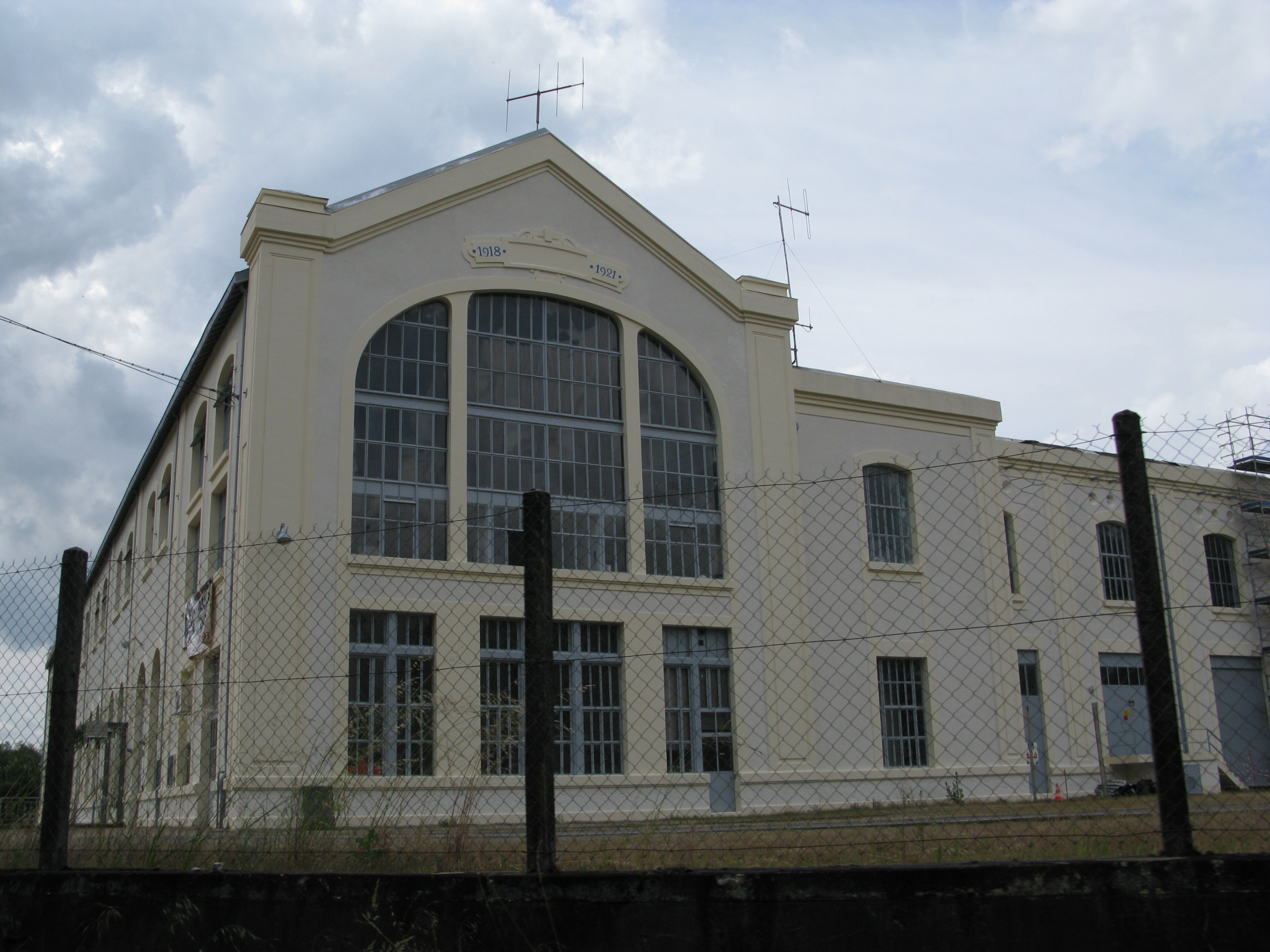 L'usine hydroélectrique associée au barrage de Mauzac.